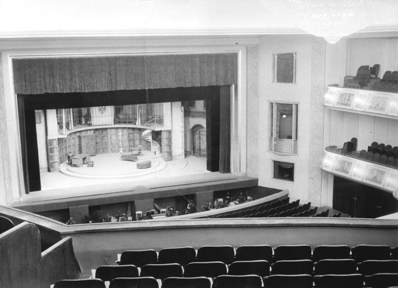 Berlin, Friedrichstraße, Metropol Theater, Zuschauerraum, Bühne Zentralbild Quasch-. 19.12.1955 Metropoltheater im neuen Haus. Am Dienstag, den 20.12.1955 gibt das Metropoltheater mit der -Fledermaus- die erste Vorstellung in seinem neuen Haus in dder Friedrichstrasse, dem ehemalicgen Admiralpalast, in dem bis vor kurzem noch die Staatsoper gastierte. UBz: Blick von Zuschauerraum auf die Bühne.